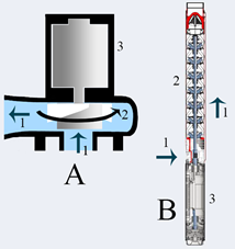 A – vienapakopis siurblys, B – daugiapakopis siurblys, 1 – skysčio tekėjimo kryptis, 2 - darbo ratai, 3 – variklis